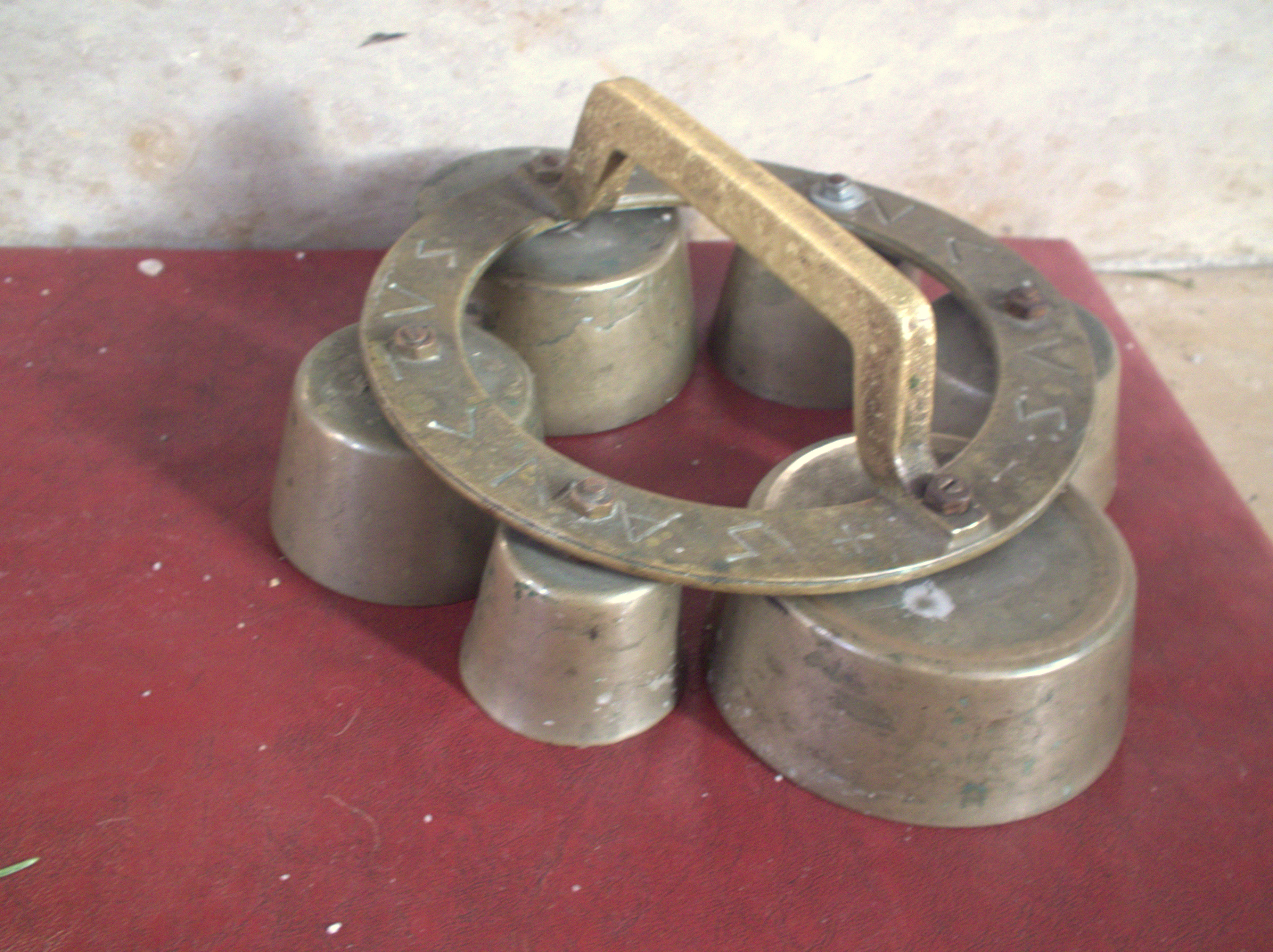 Pfarrkirche St. Andreas in Parsberg